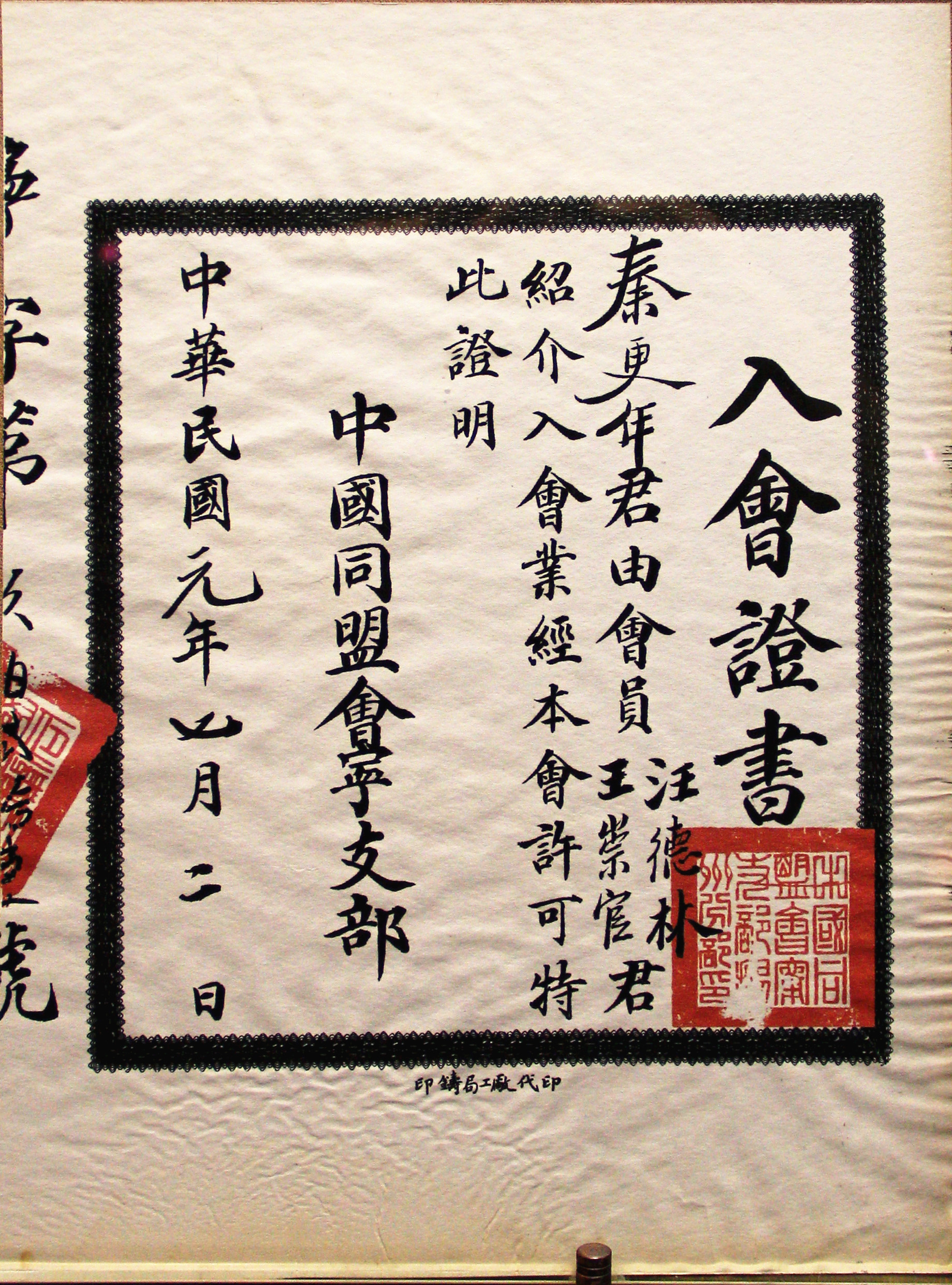 中國同盟會證書。展出於廣州近代史博物館。